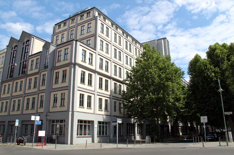 Sitz des Humanistischen Verbandes in Berlin